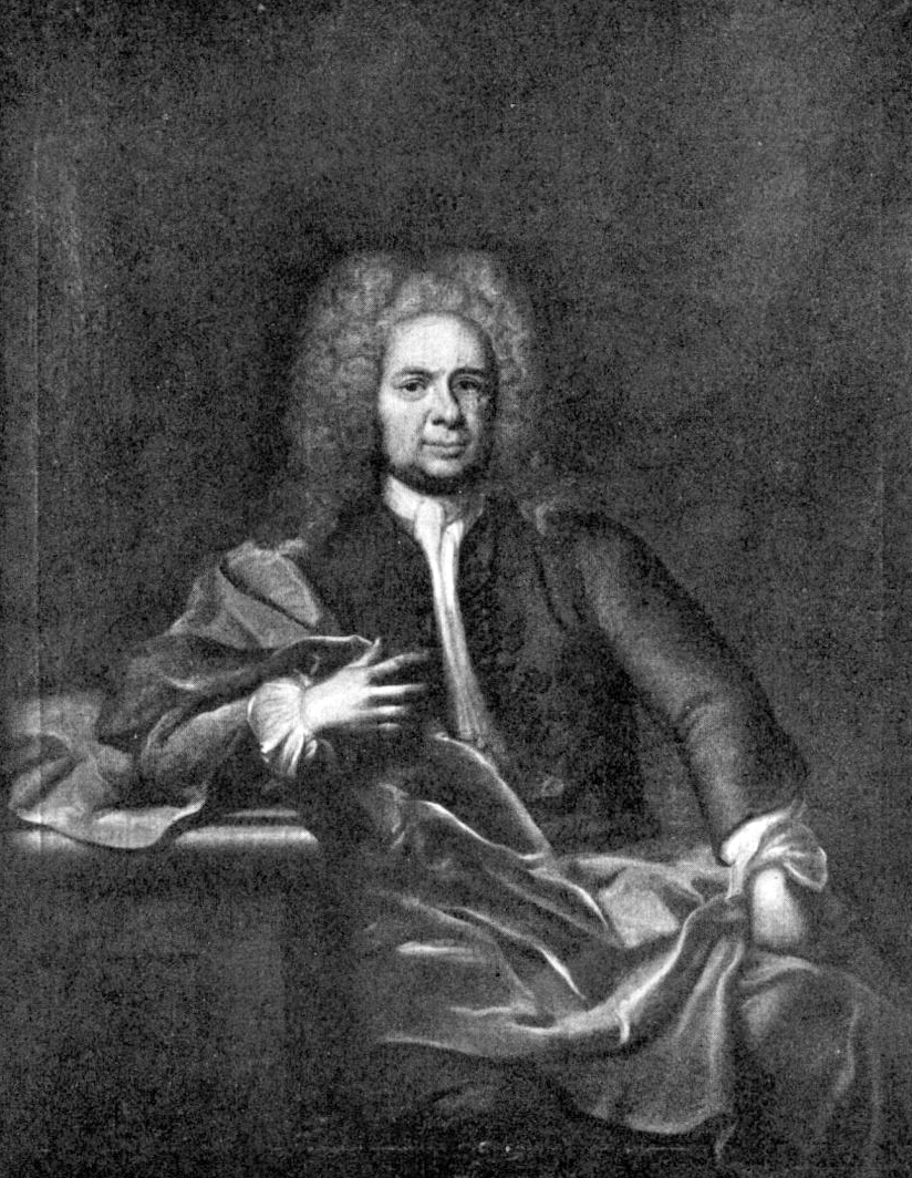 Sebastian Tham (1666–1729).